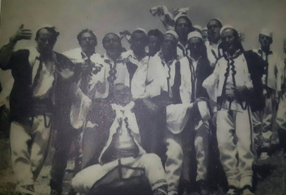 Krushq duke kënduar